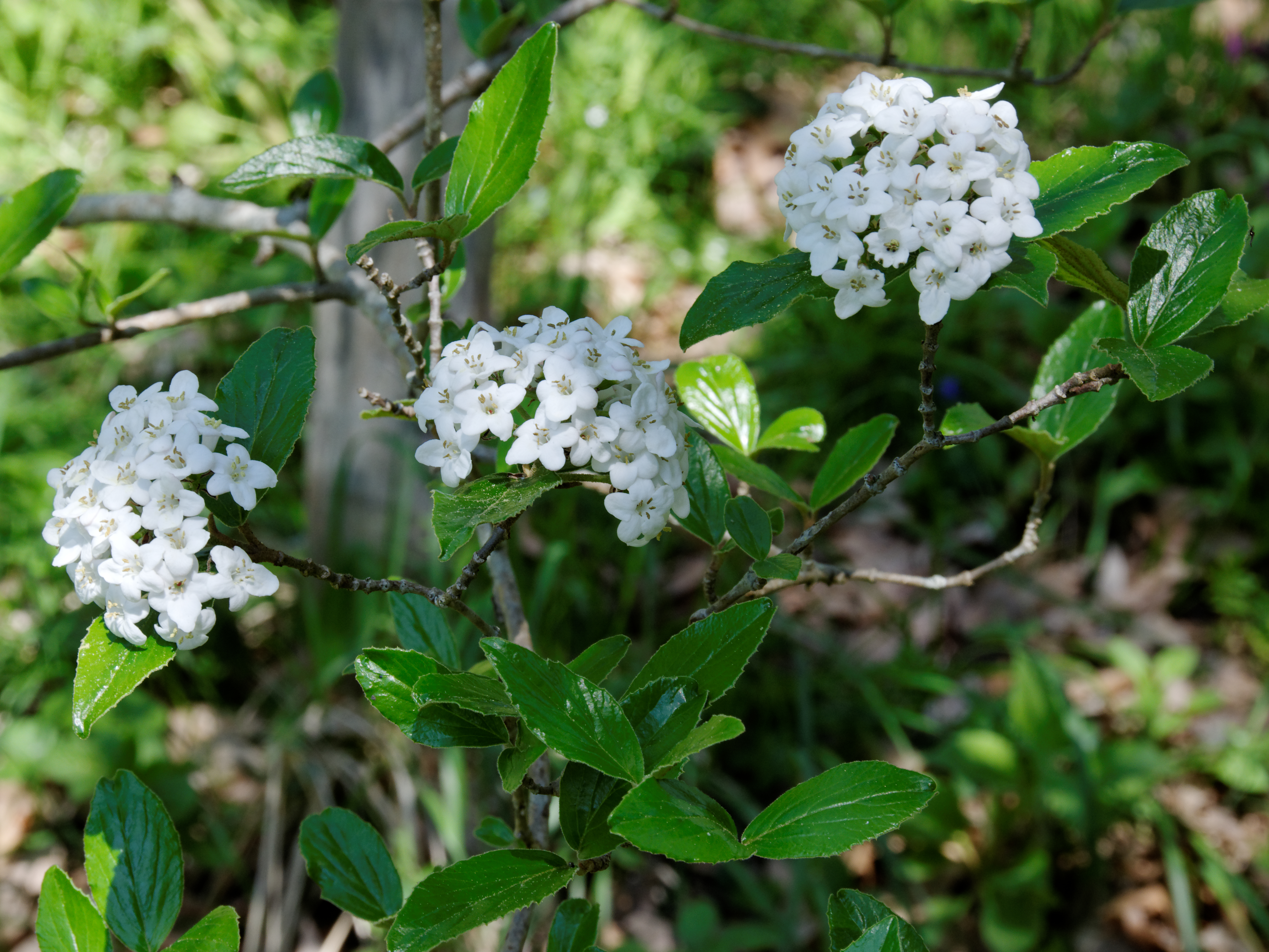 Viburnum x burkwooduu Burkw. & Skip. Photogaphié à l'arboretum de Pézanin, Dompierre-les-Ormes (France)